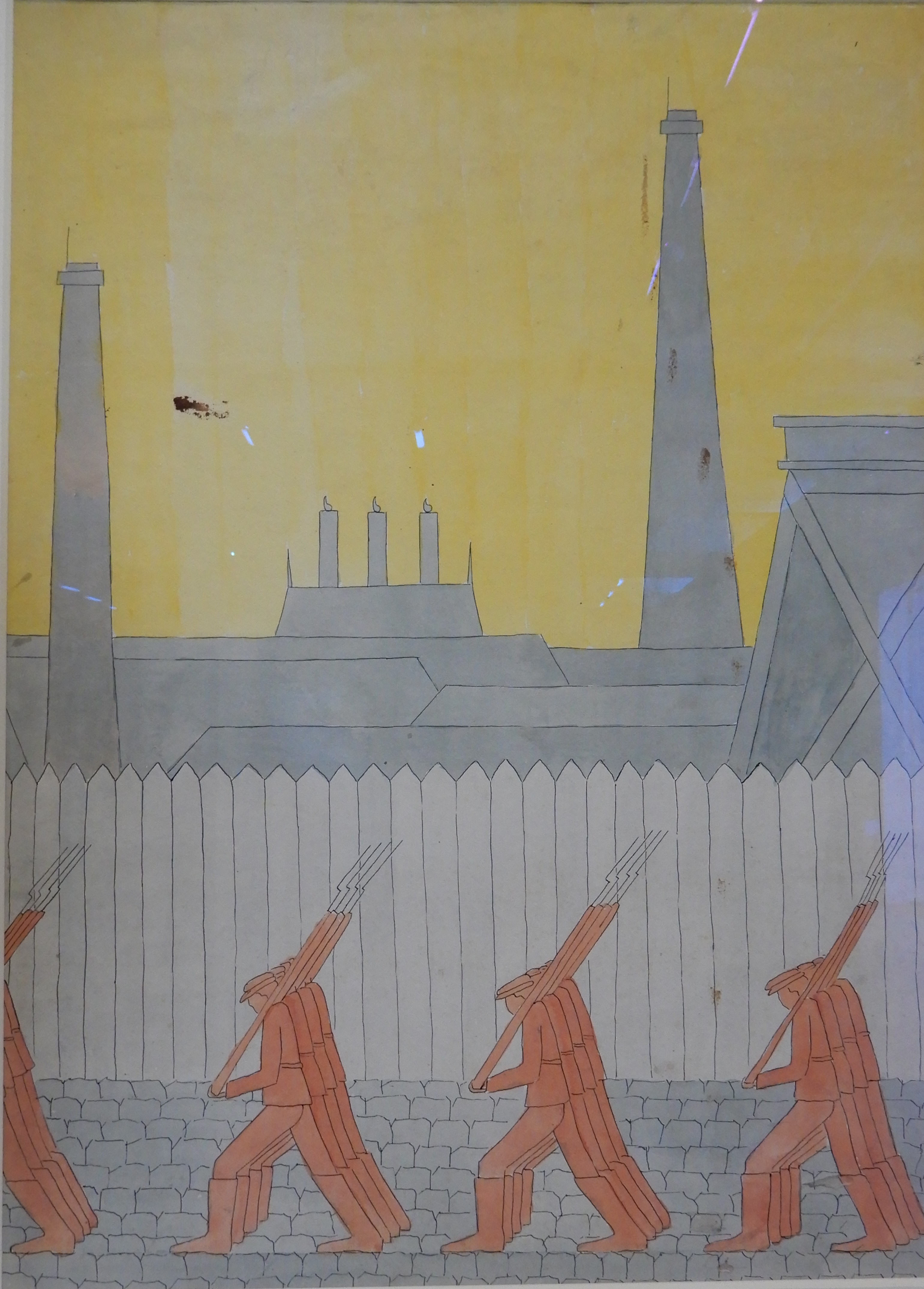 Défilé de gardes rouges devant une usine.